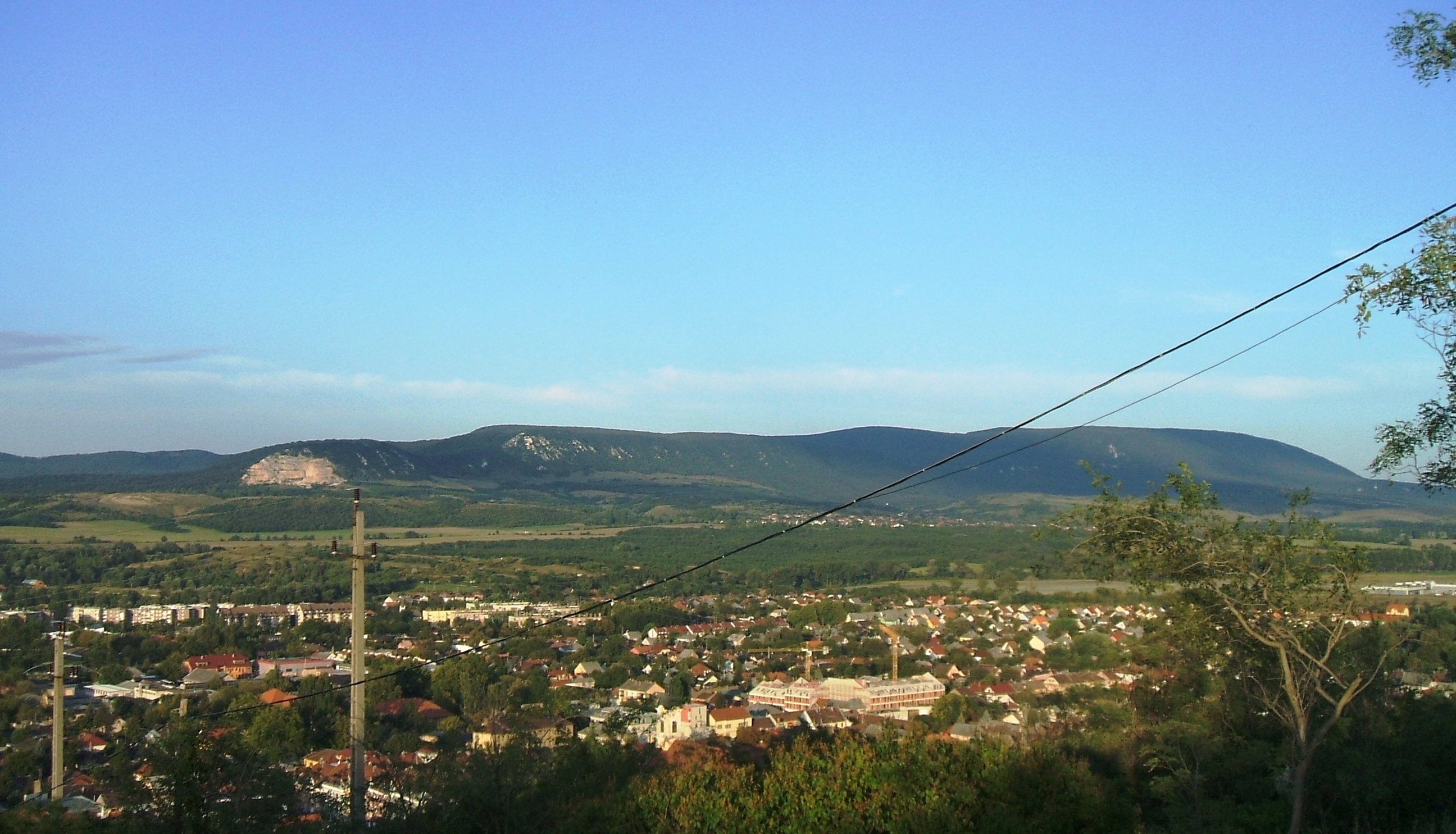 Pilis Mountain, Hungary